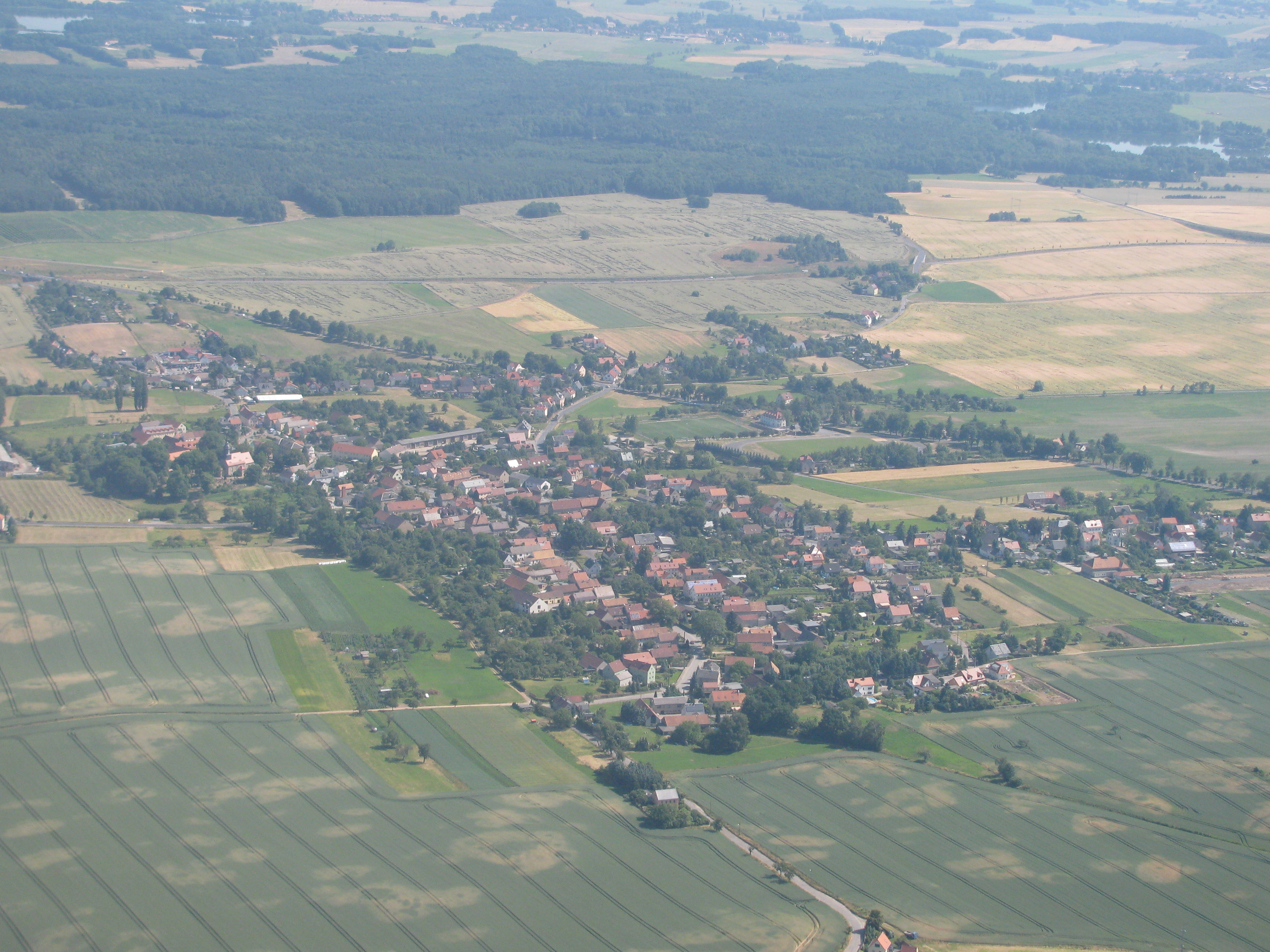 Luftbild Reichenberg, Gemeinde Moritzburg